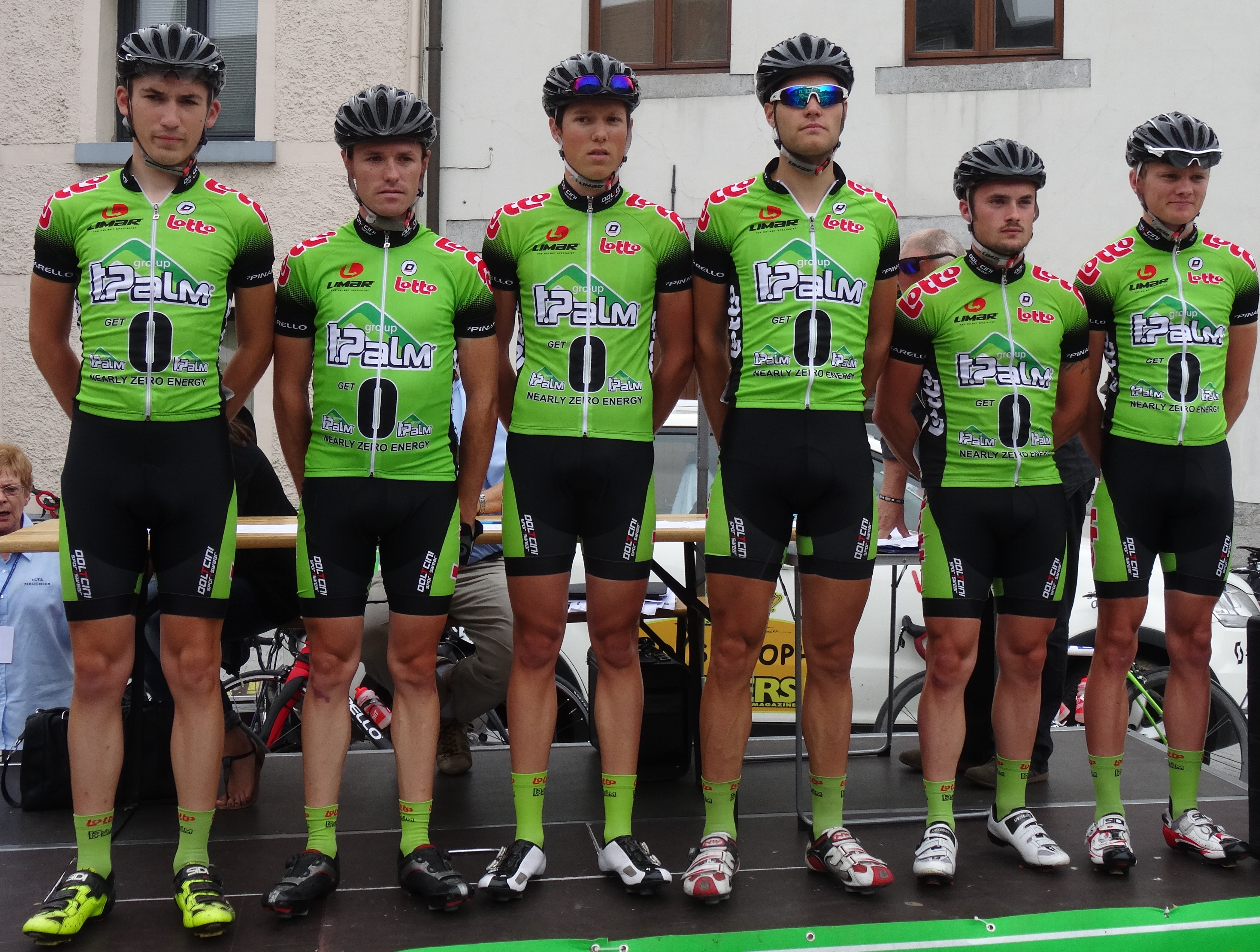 Reportage photographique réalisé le mercredi 6 août à l'occasion du départ de la première étape du Tour de la province de Namur 2014 à Jambes (Namur), Belgique.